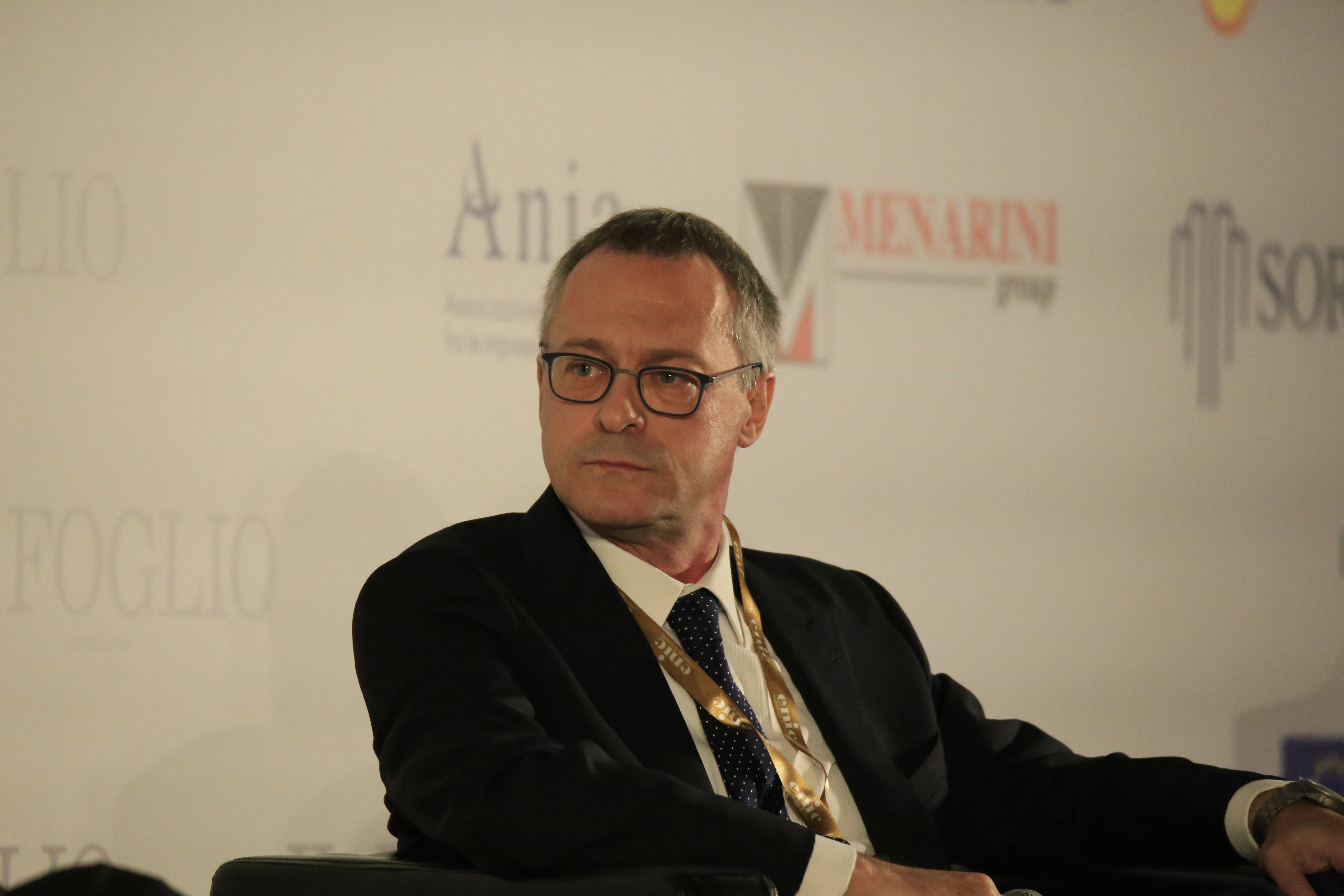 Carlo Bonomi presidente di Assolombarda; alla festa del IL FOGLIO 2019 a Palazzo Vecchio, Firenze